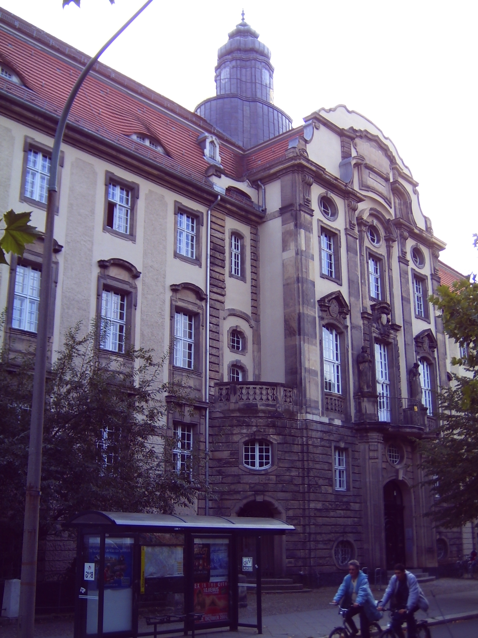 Amtsgericht Pankow-Weißensee, Kissingenstraße, Berlin